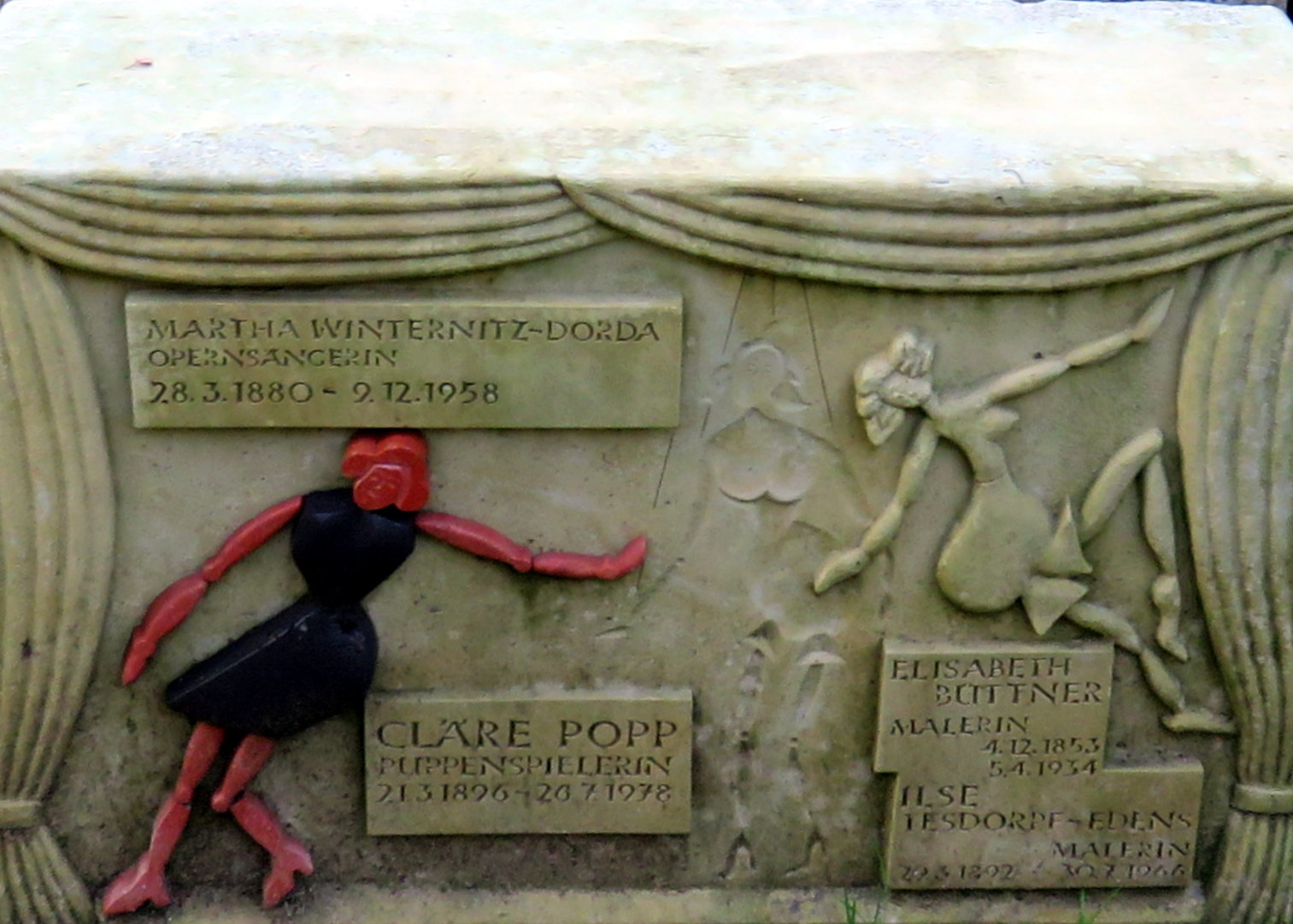 Gedenkstein für die Malerin Ilse Tesdorpf-Edens in der Erinnerungsspirale im Bereich des Gartens der Frauen auf dem Ohlsdorfer Friedhof in Hamburg-Ohlsdorf, zusammen mit der Sopranistin und Gesangspädagogin MarthaWinternitz-Dorda, der bildenden Künstlerin Cläre Popp und der Malerin Elisabeth Büttner.